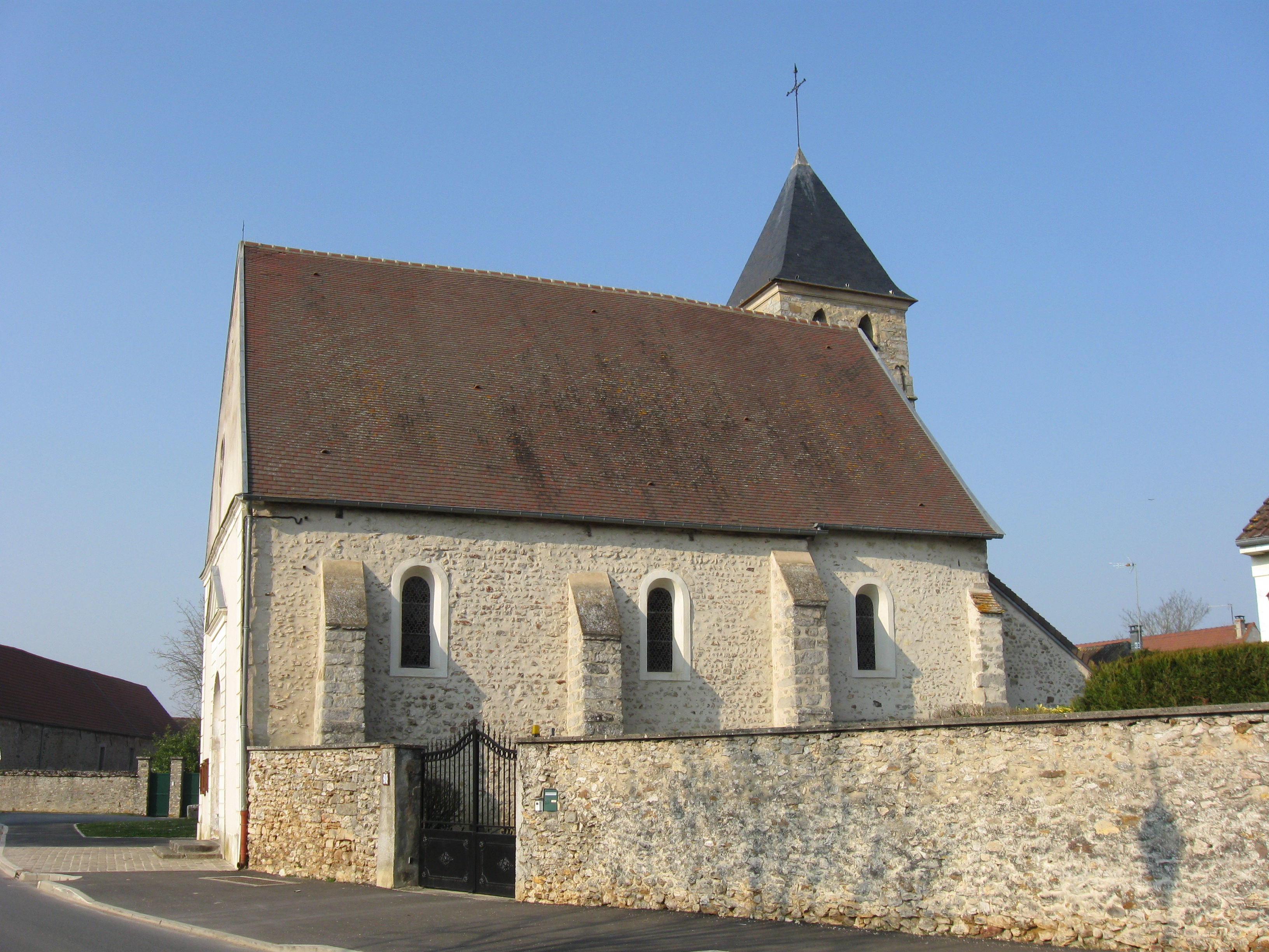 Église Saint-Germain de Saint-Germain-Laxis. (Seine-et-Marne, région Île-de-France).